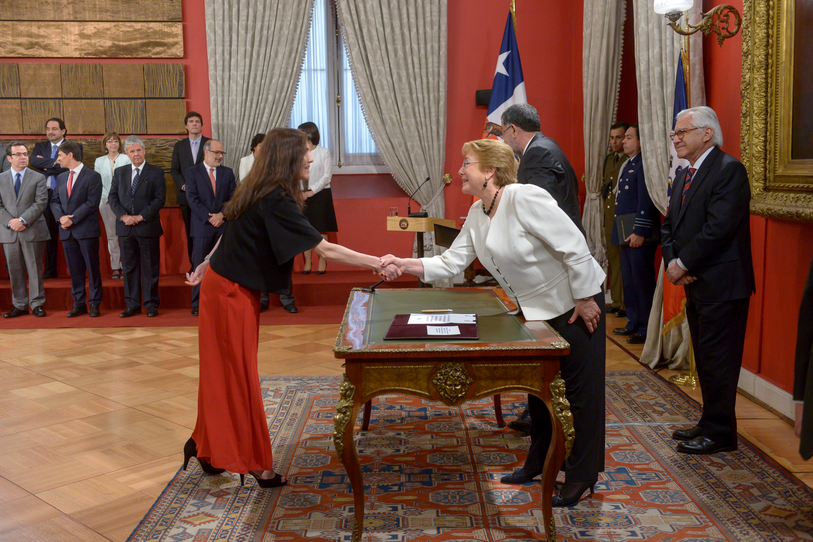 Presidenta de la Republica realiza cambio de Gabinete, donde asume como nueva vocera de Gobierno la Ministra Paula Narváez